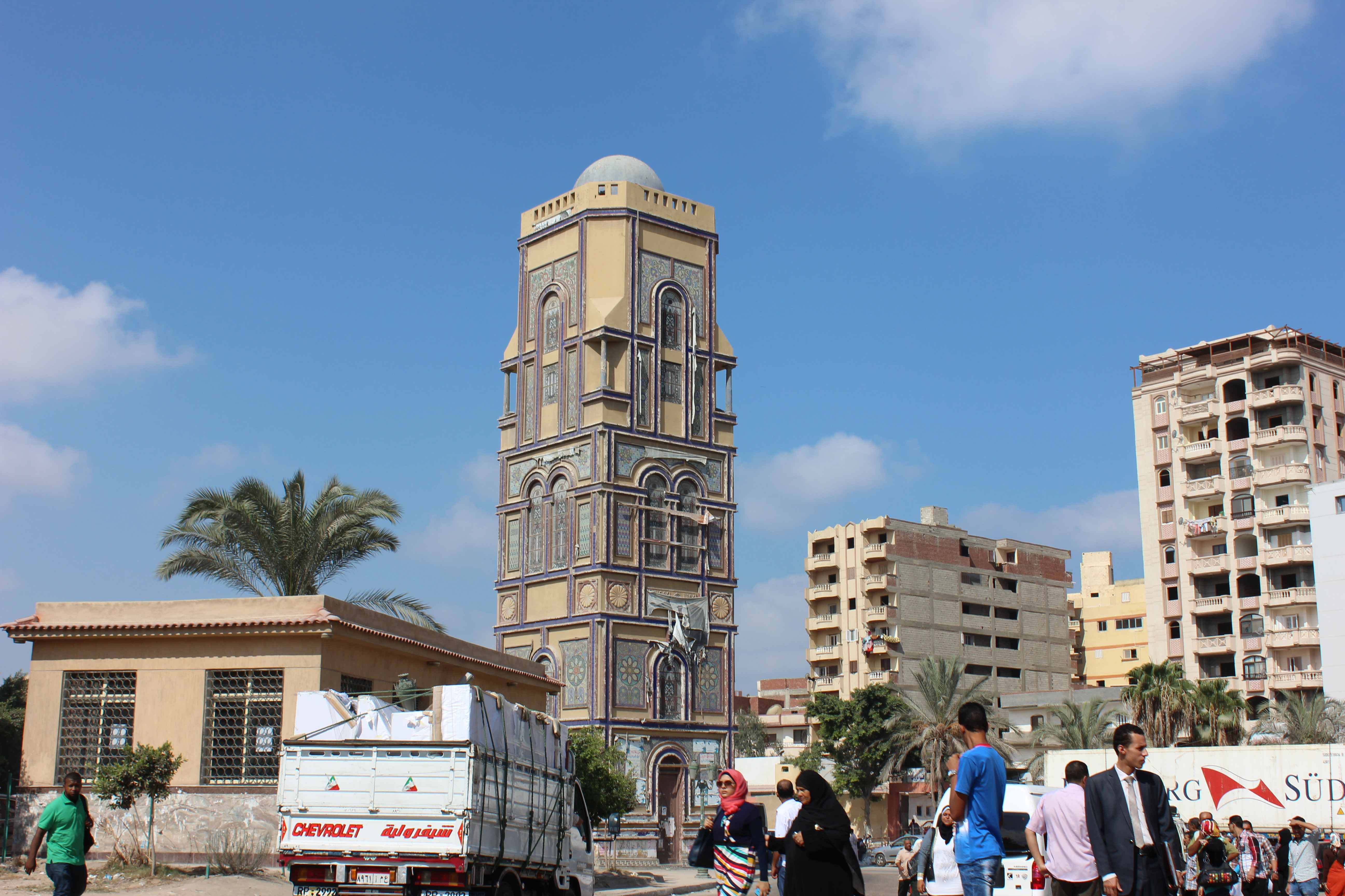 العمود أو برج الساعة على مدخل العجمي في الكيلو 21.